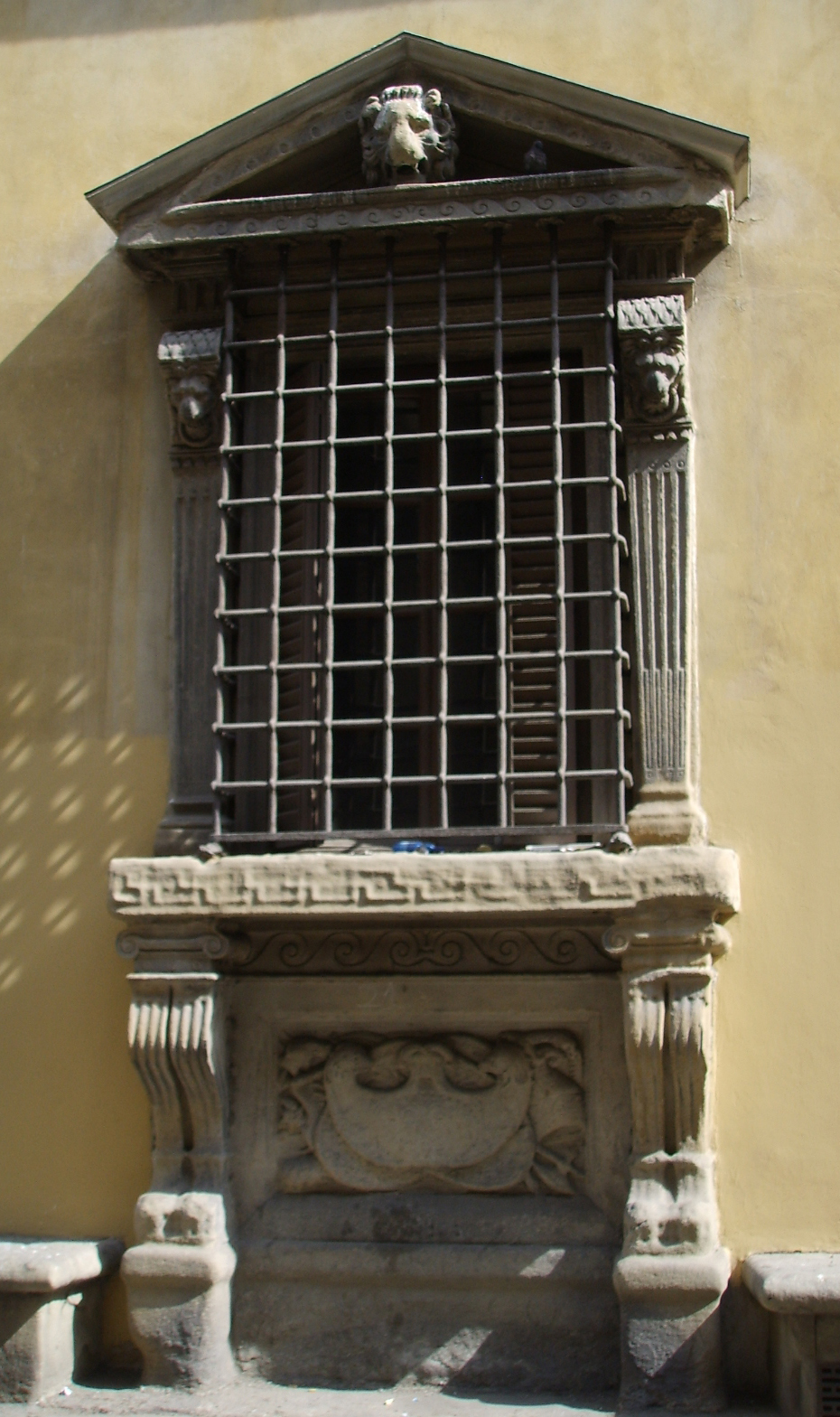 "Finestra inginocchiata", attribuita a Bartolomeo Ammannati, dal Palazzo di Sforza Almeni in via dei Servi a Firenze.